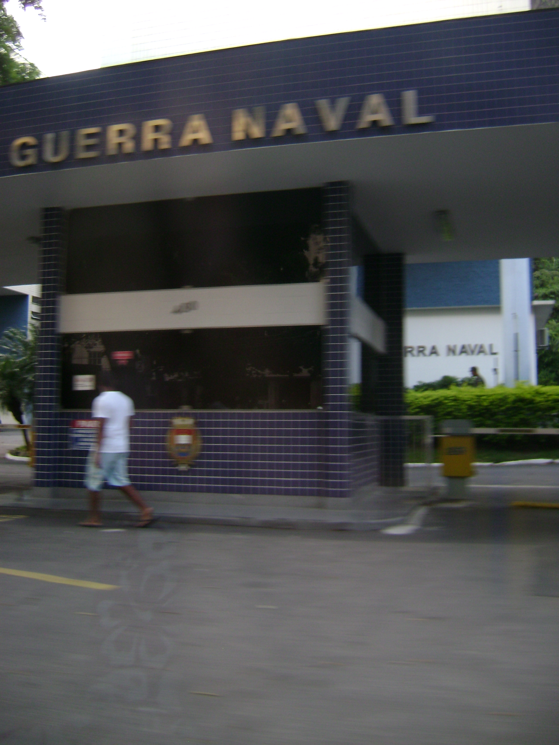 Fachada da Escola de Guerra Naval do Rio de Janeiro.